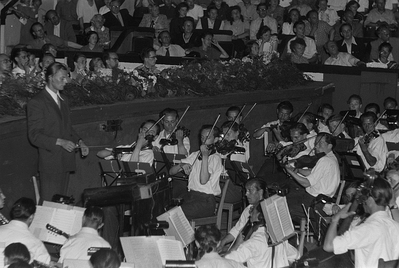 Original image description from the Deutsche FotothekOrchester im Orchestergraben